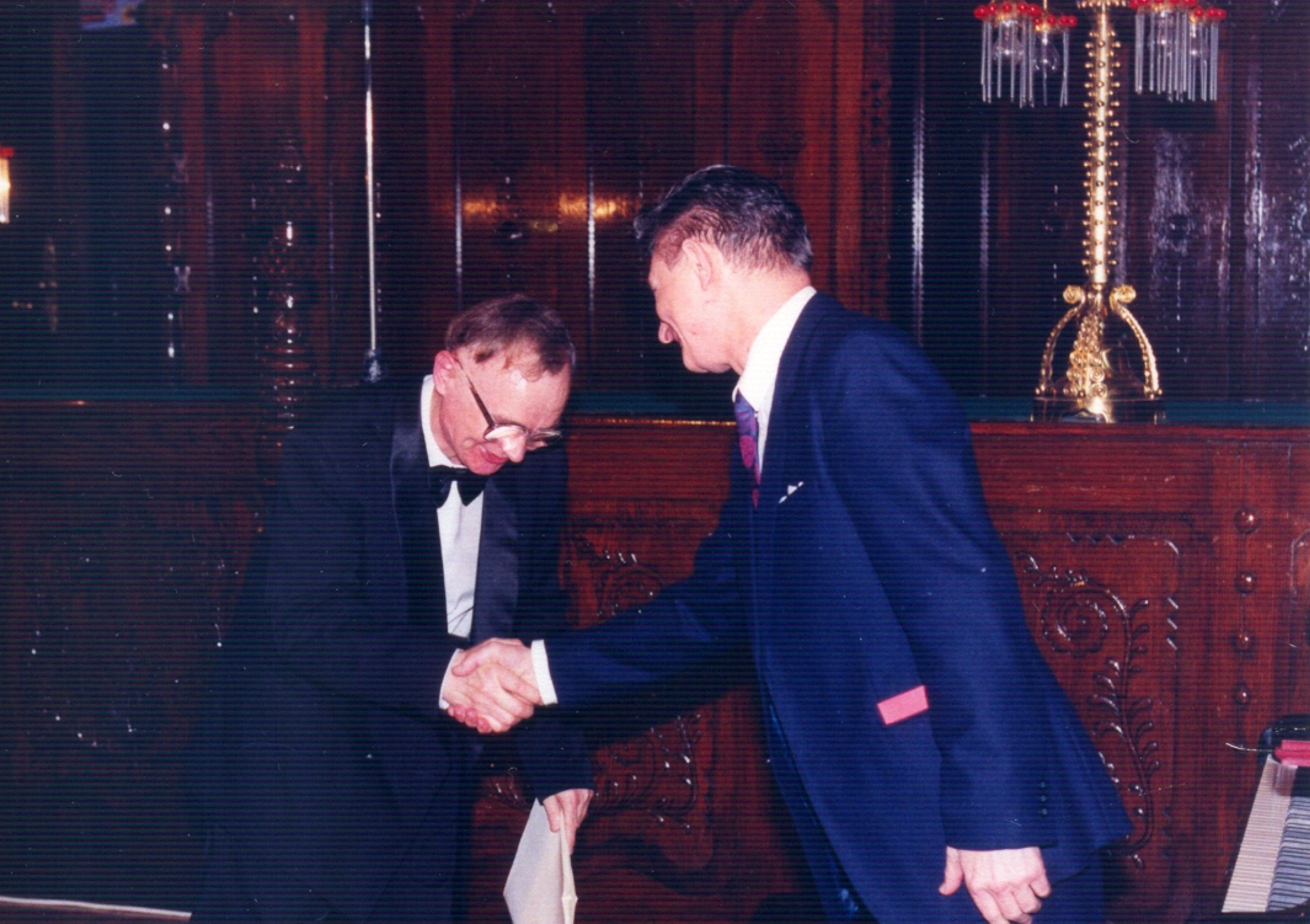 Kézfogás Szelecsényi Norberttel (Szerzői est, 2000. Május 5., a szabadkai Városháza díszterme)